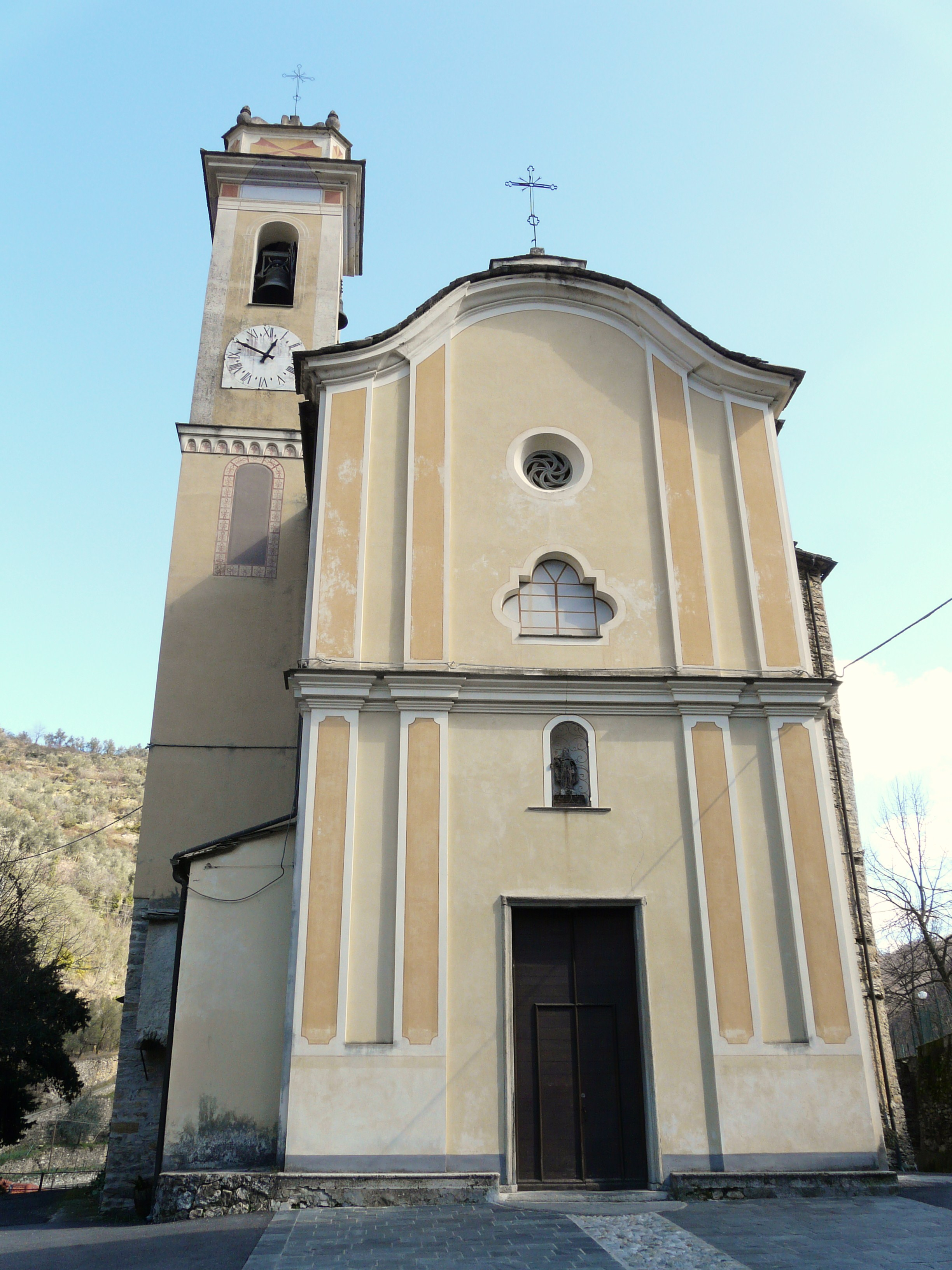 Chiesa di Sant'Antonio, Lavina, Rezzo, Liguria, Italia